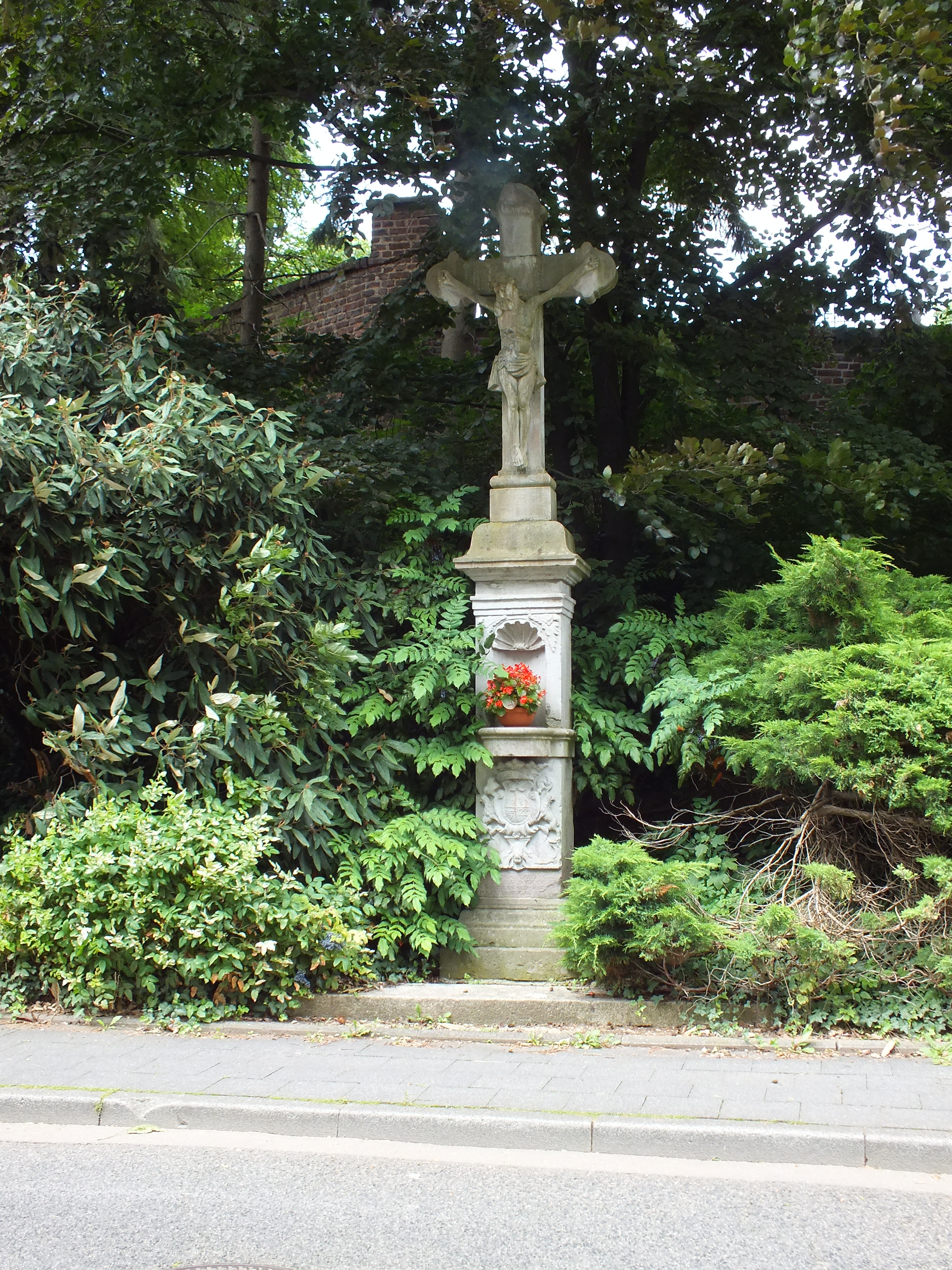 Fronhofkreuz von 1725, stand früher am beim Bau des Bahnhofes abgerissenen FronhofThis is a photograph of an architectural monument. /109